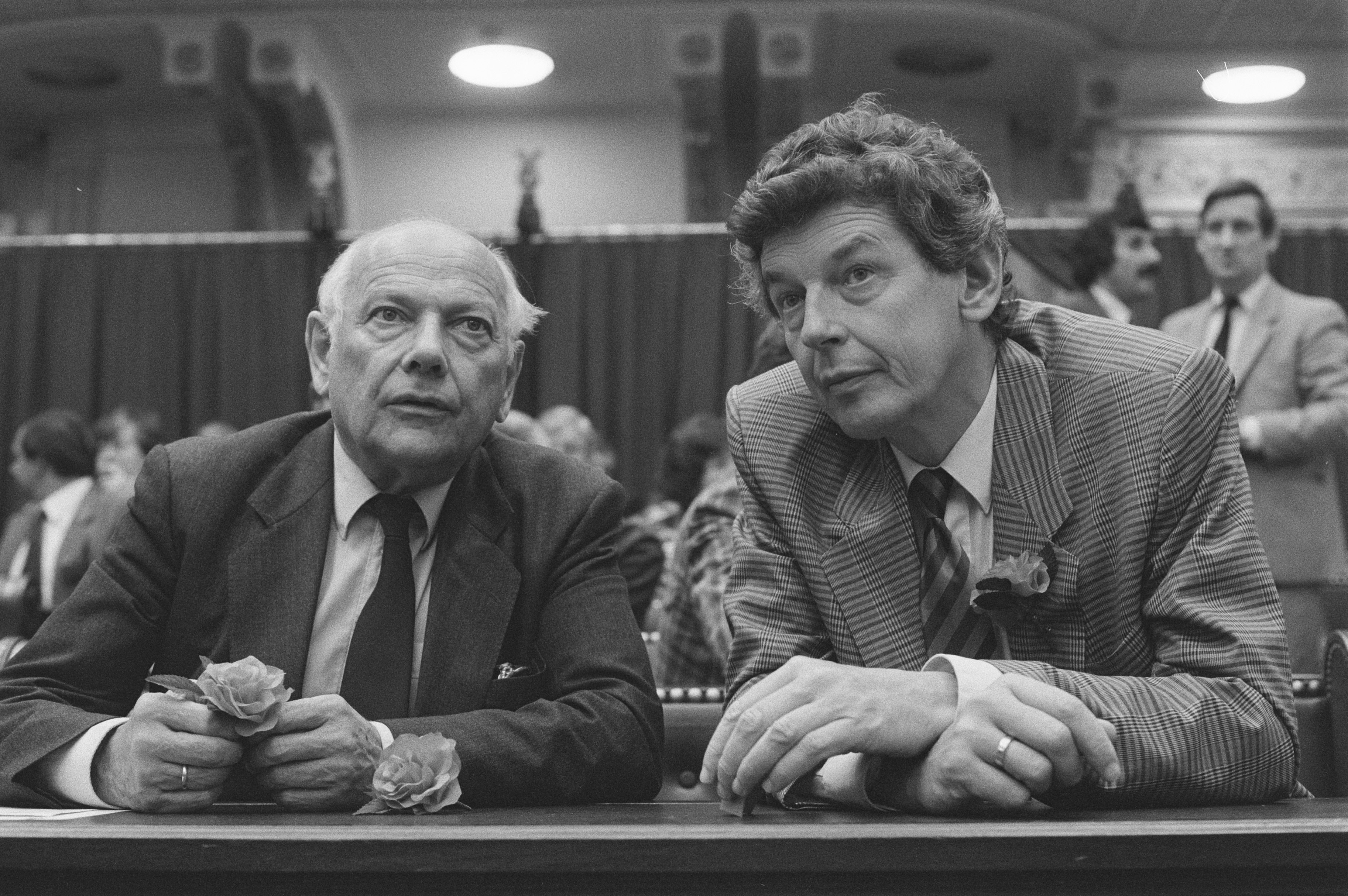 Collectie / Archief : Fotocollectie Anefo Reportage / Serie : [ onbekend ] Beschrijving : Beediging (nieuw) gekozen leden Tweede Kamer ; PvdA-fractievoorzitter den Uyl (l) en diens toekomstige opvolger Wim Kok (r) / Datum : 3 juni 1986 Trefwoorden : beedigingen, leden Persoonsnaam : Kok, Wim, Uyl, Joop den Fotograaf : Croes, Rob C. / Anefo Auteursrechthebbende : Nationaal Archief Materiaalsoort : Negatief (zwart/wit) Nummer archiefinventaris : bekijk toegang 2.24.01.05 Bestanddeelnummer : 933-6757